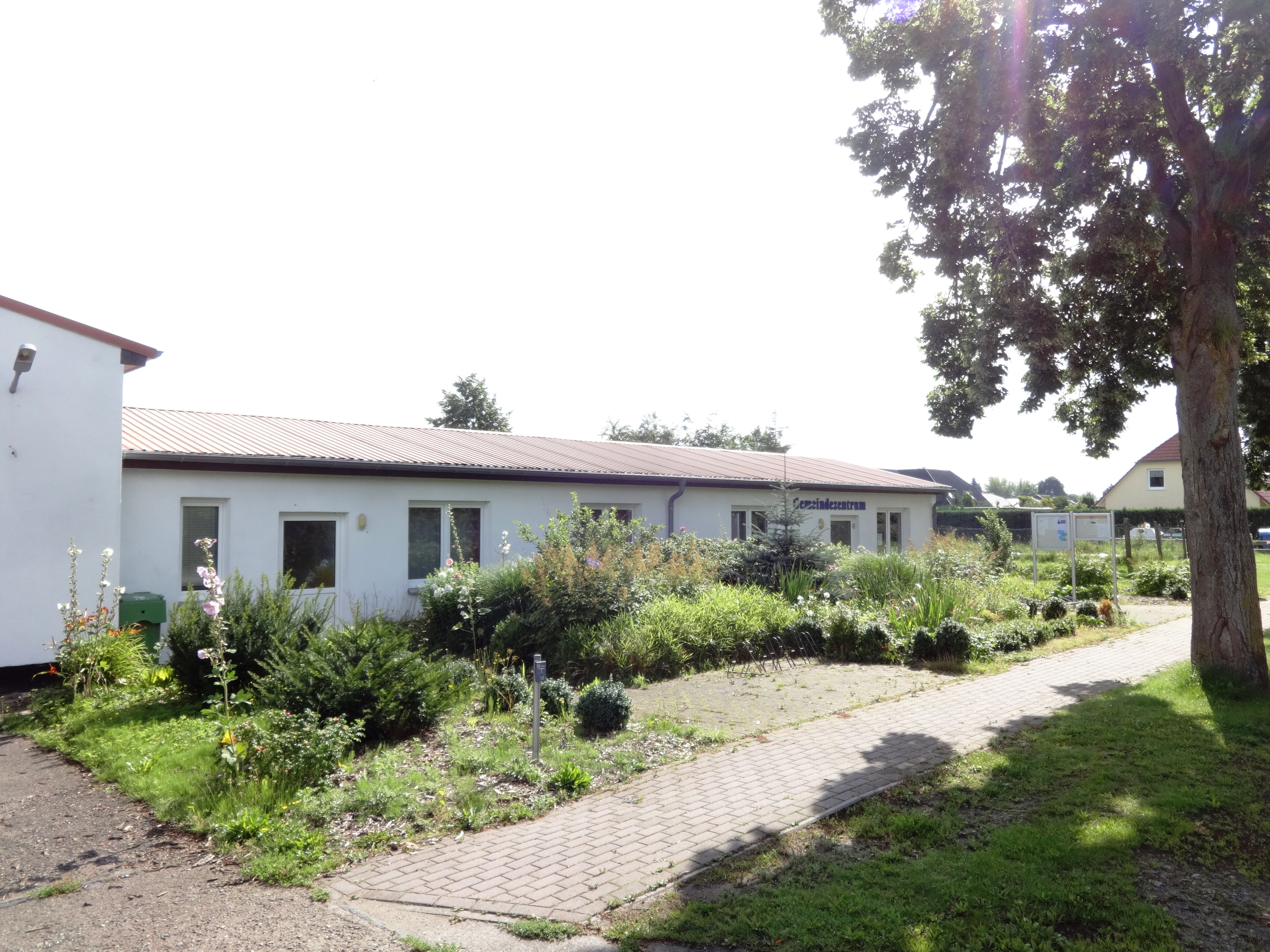 Gebäude in Mesekenhagen, einer Gemeinde im Landkreis Vorpommern-Greifswald in Mecklenburg-Vorpommern